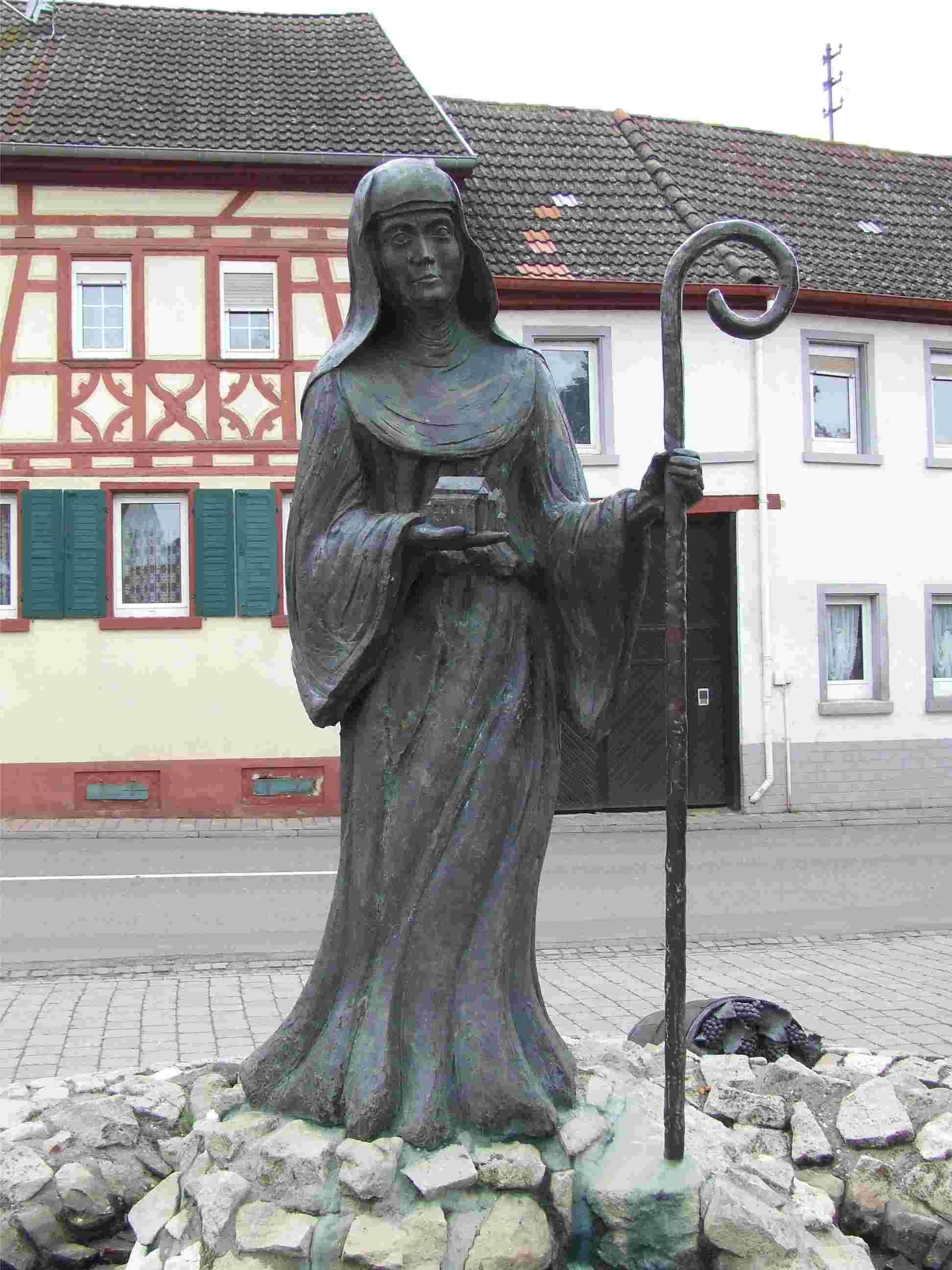 Denkmal der Lioba von Tauberbischofsheim in Schornsheim